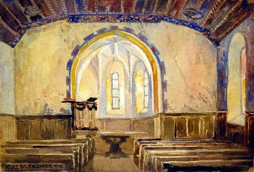 das Innere der reformierten Kirche Schuders (bei Schiers), Aquarell von 1916